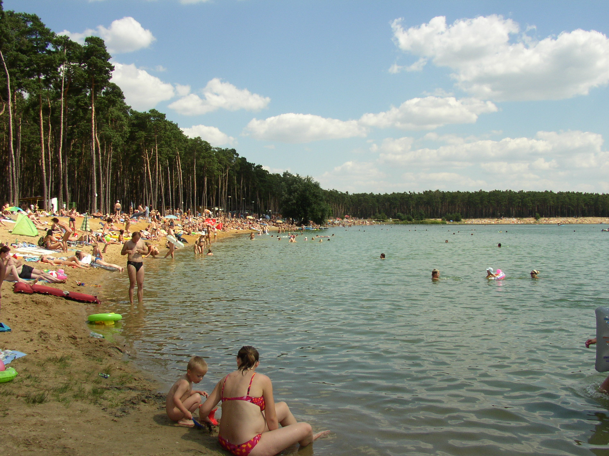 Koupaliště Lhota u Brandýse nad labem